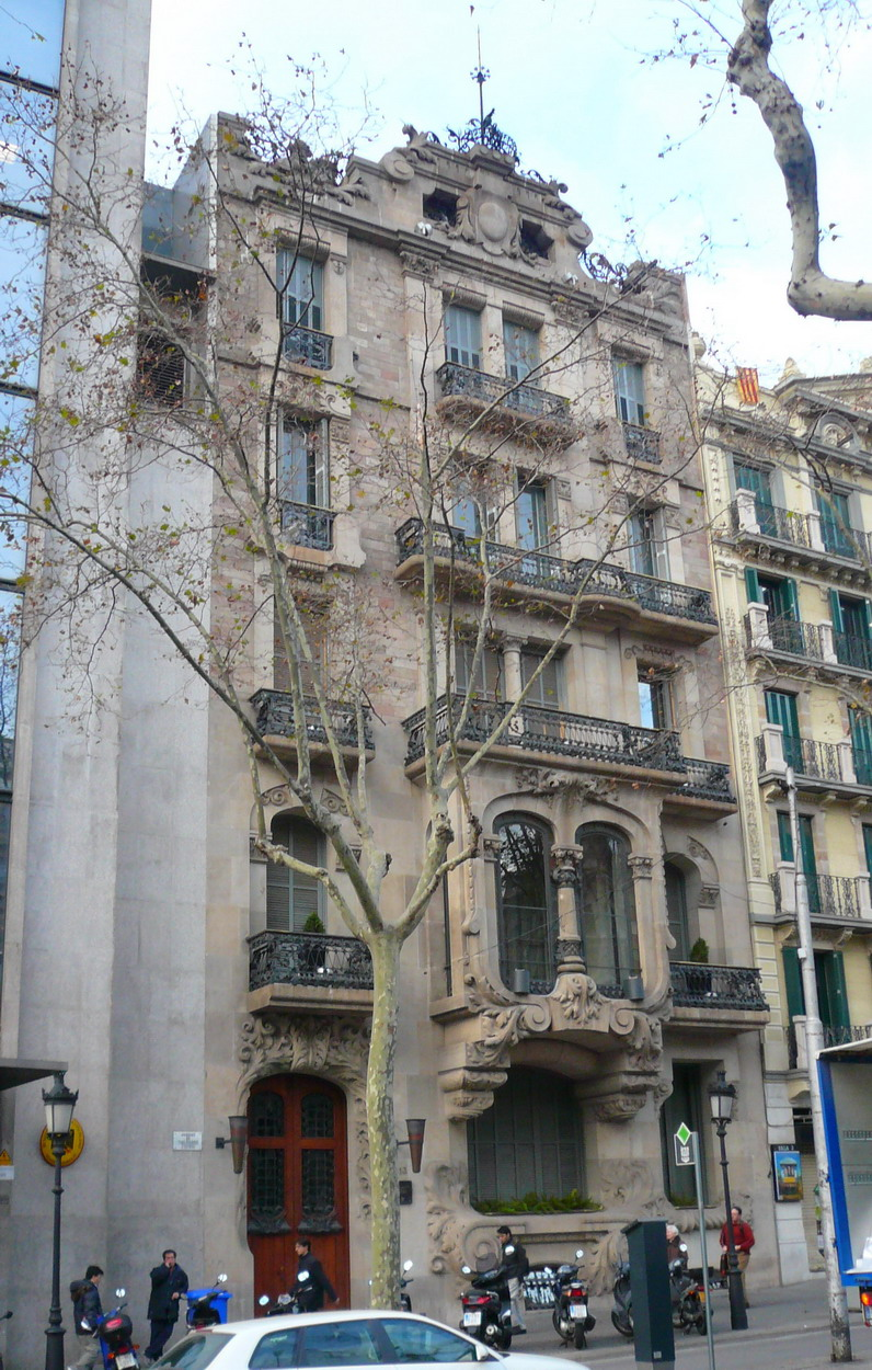 Casa Ferrer, al passeig de Gràcia 113 de Barcelona, obra de 1906 de l'arquitecte Pere Falqués